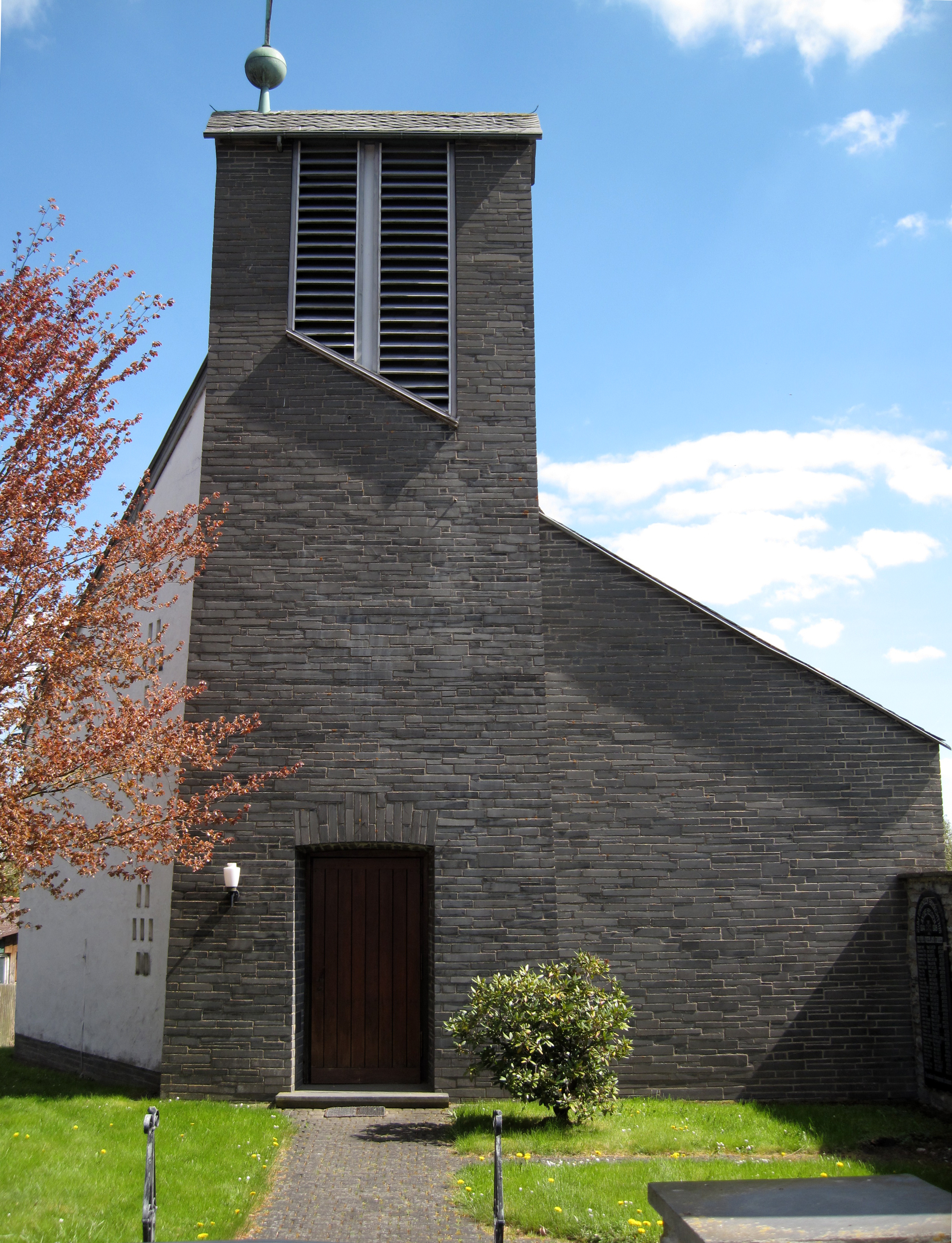 Kirche, Stormbruch, Teilansicht außen, Gemeinde Diemelsee, Hessen, Deutschland